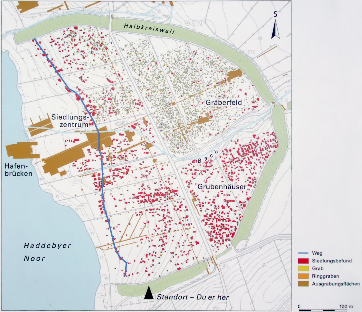 Lageplan von Haithabu (draussen auf dem Nordwall fix angebracht)